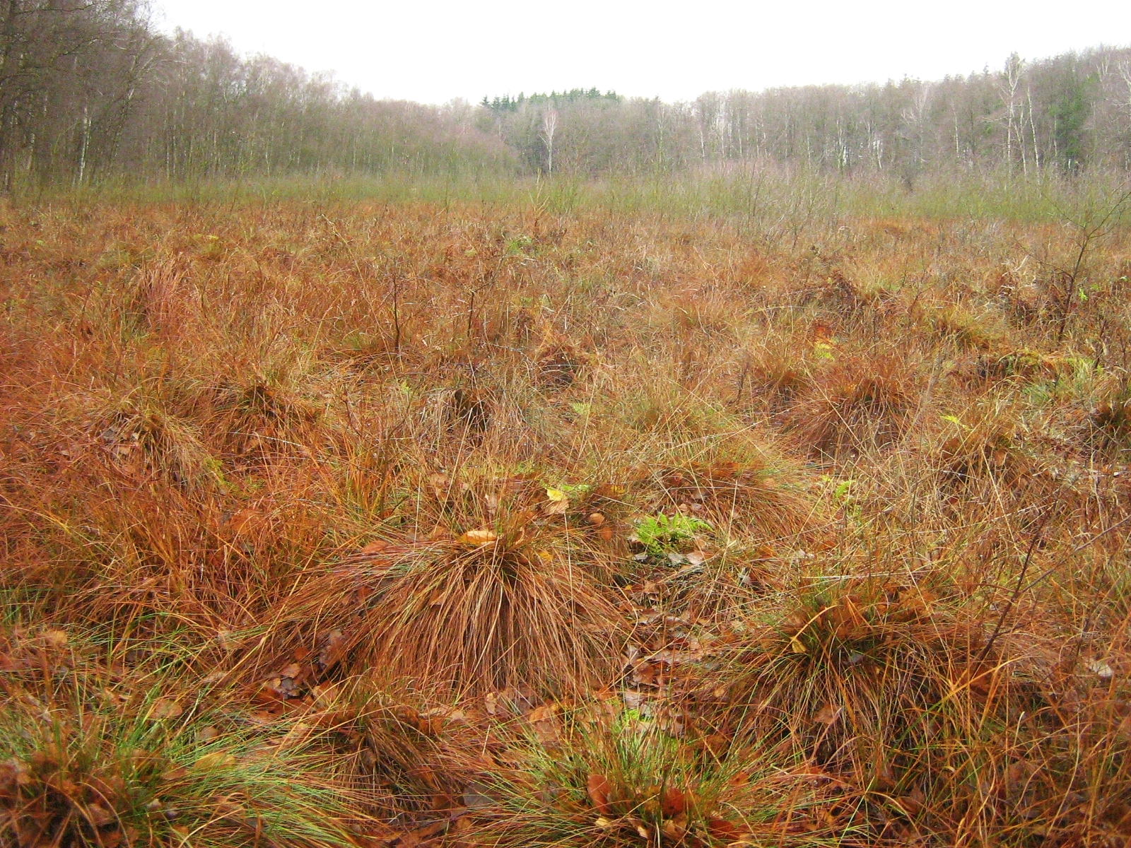 Hochmoor am Nordrand des Burgwalles auf dem Schanzenberg bei Rothemühl, Landkreis Uecker-Randow.